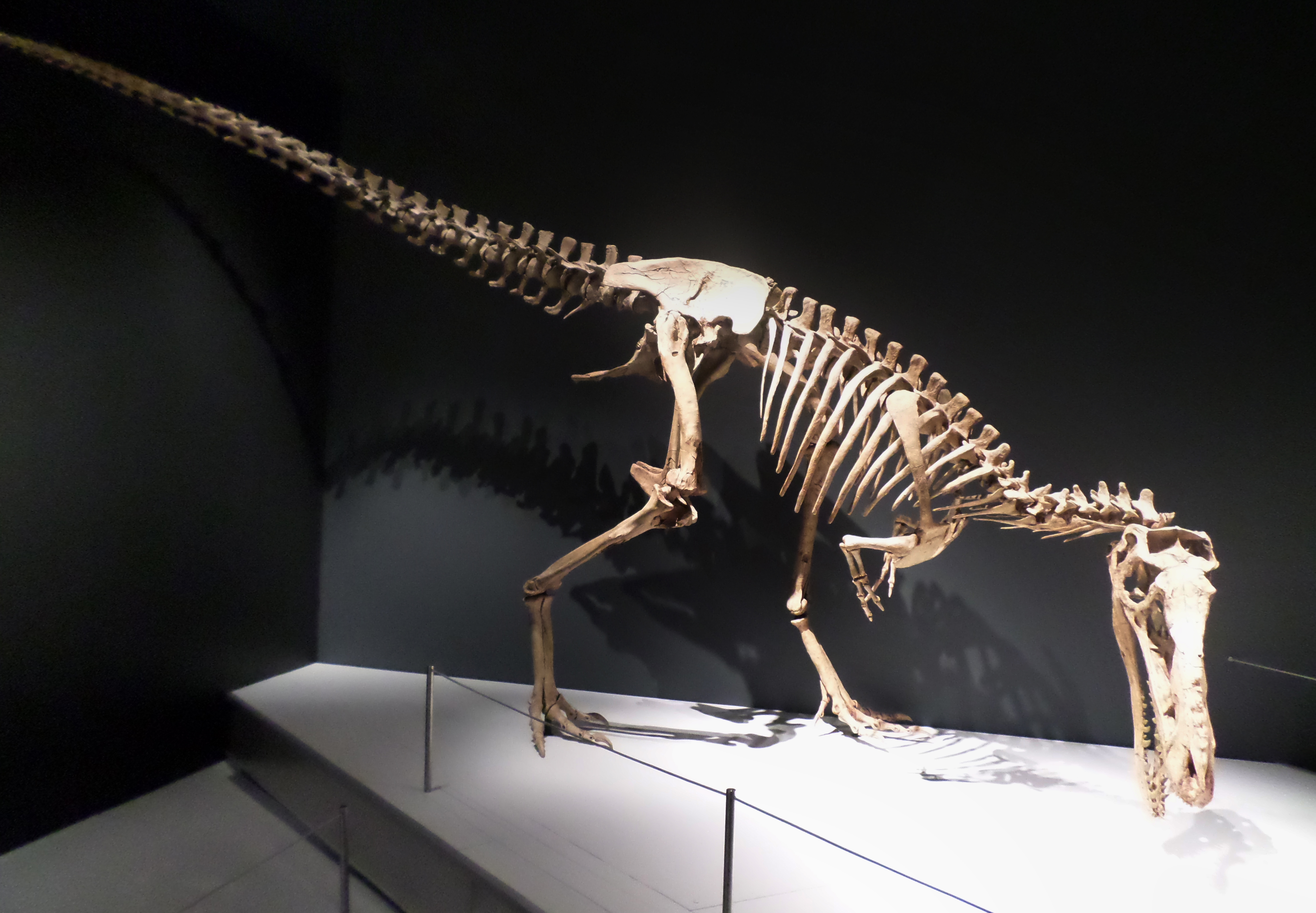 SAMSUNG CAMERA PICTURES